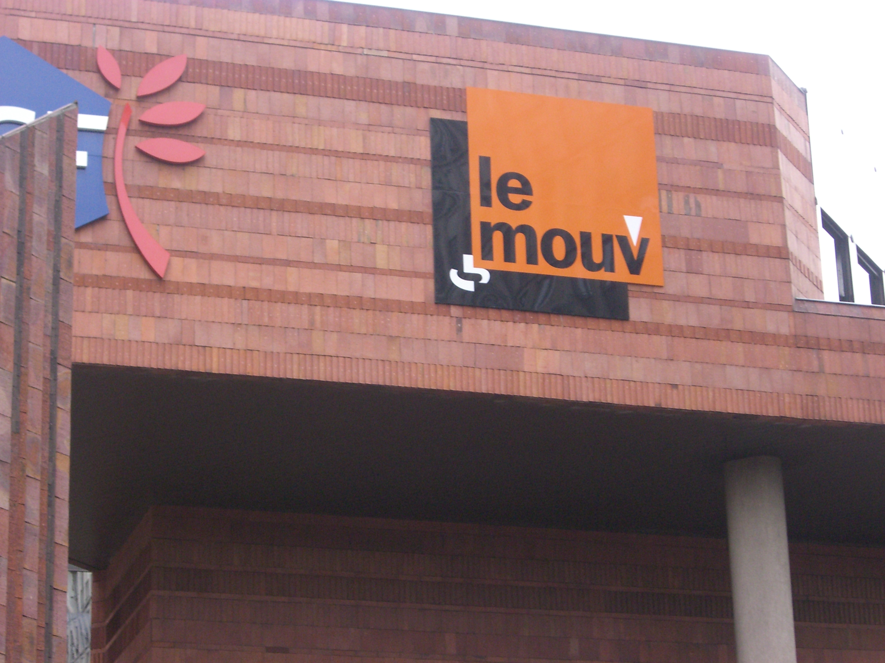 Toulouse (Haute-Garonne, France) : Bâtiment ou se trouvent les studio de la radio Le Mouv'.